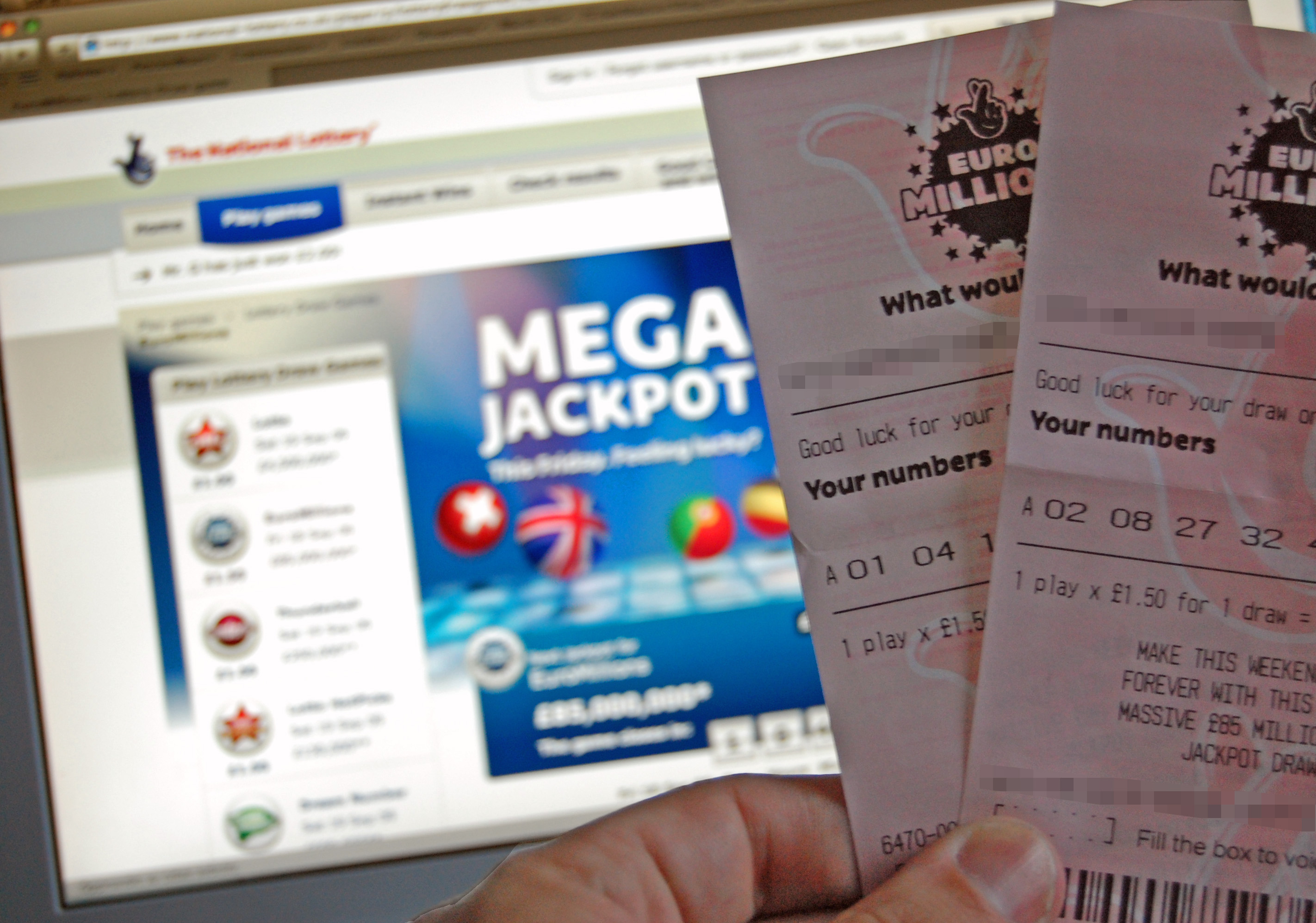 Håll tummarna!